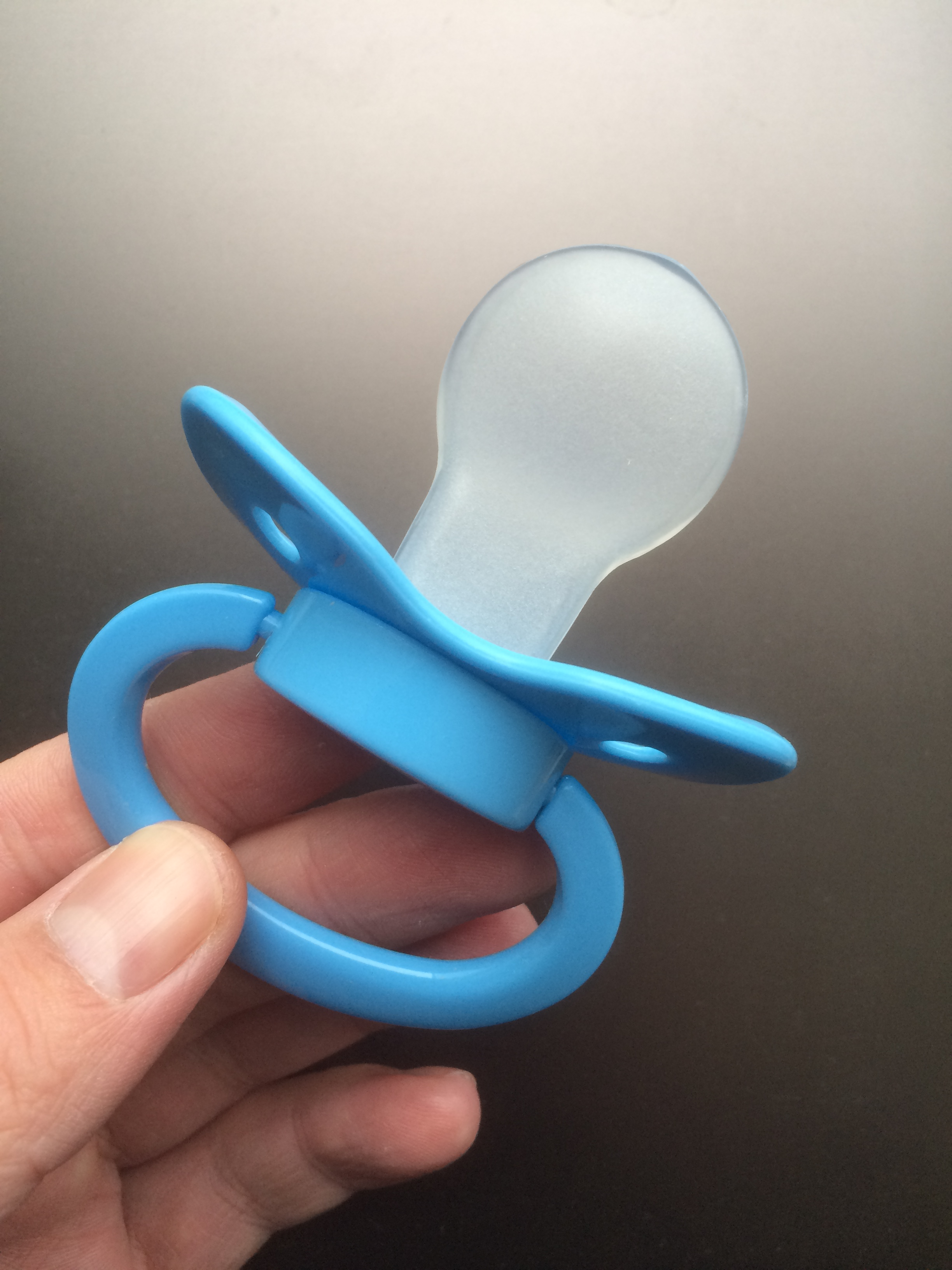 ABDL Schnuller